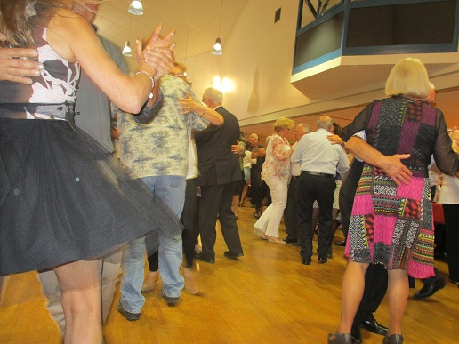 bal musette